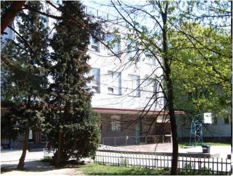 Základná škola kniežaťa Pribinu Nitra